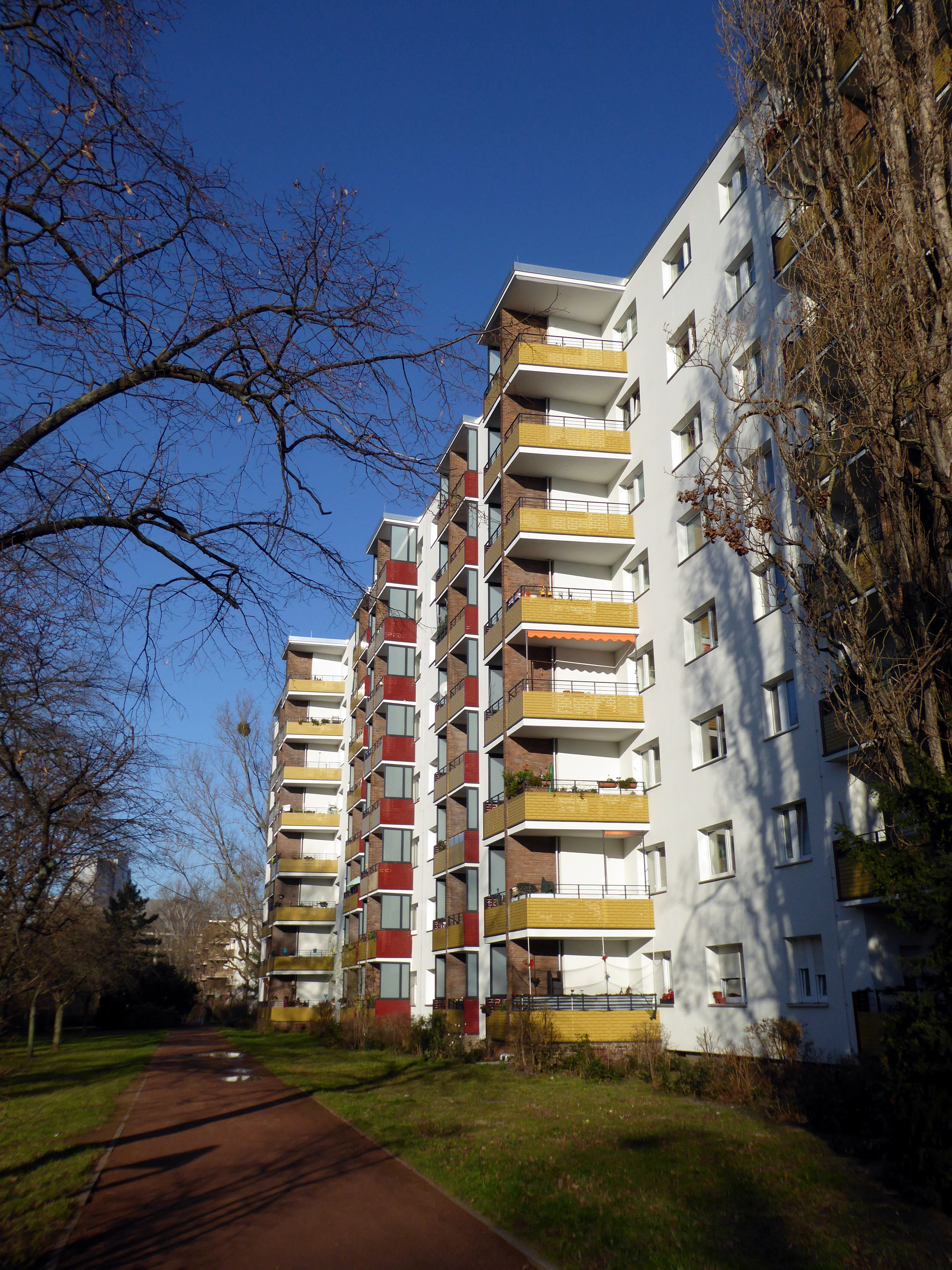 Berlin-Kreuzberg Alexandrinenstraße Otto-Suhr-Siedlung